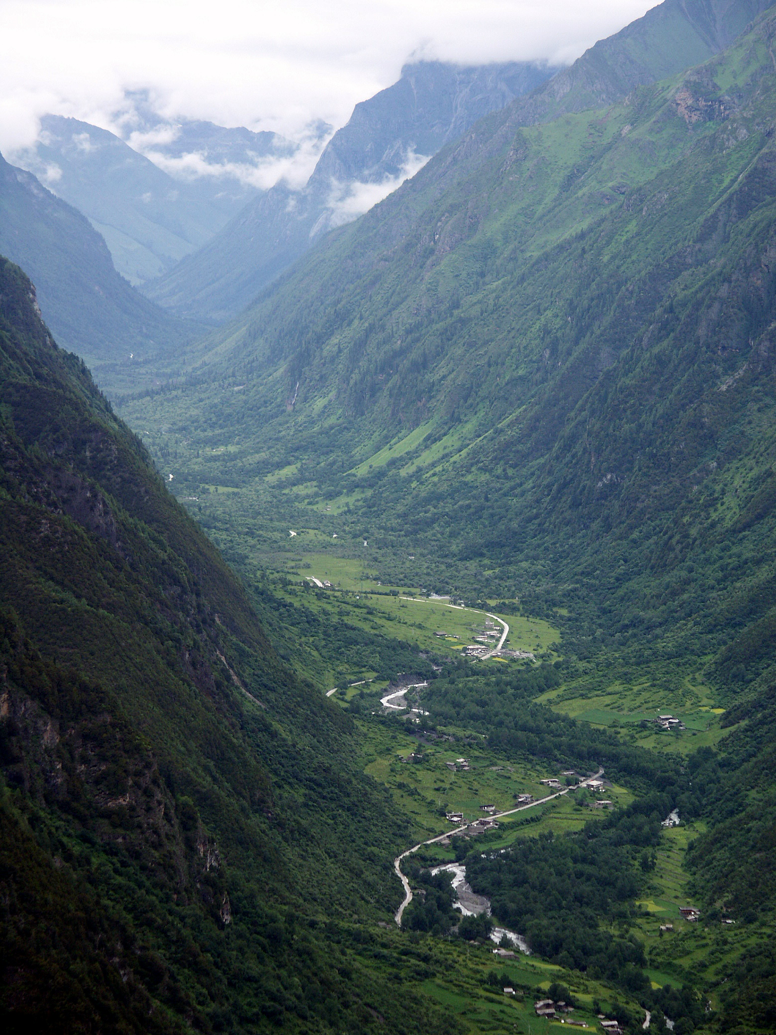 Siguniangshan, shuangqiaogou, Aba, Sichuan, China